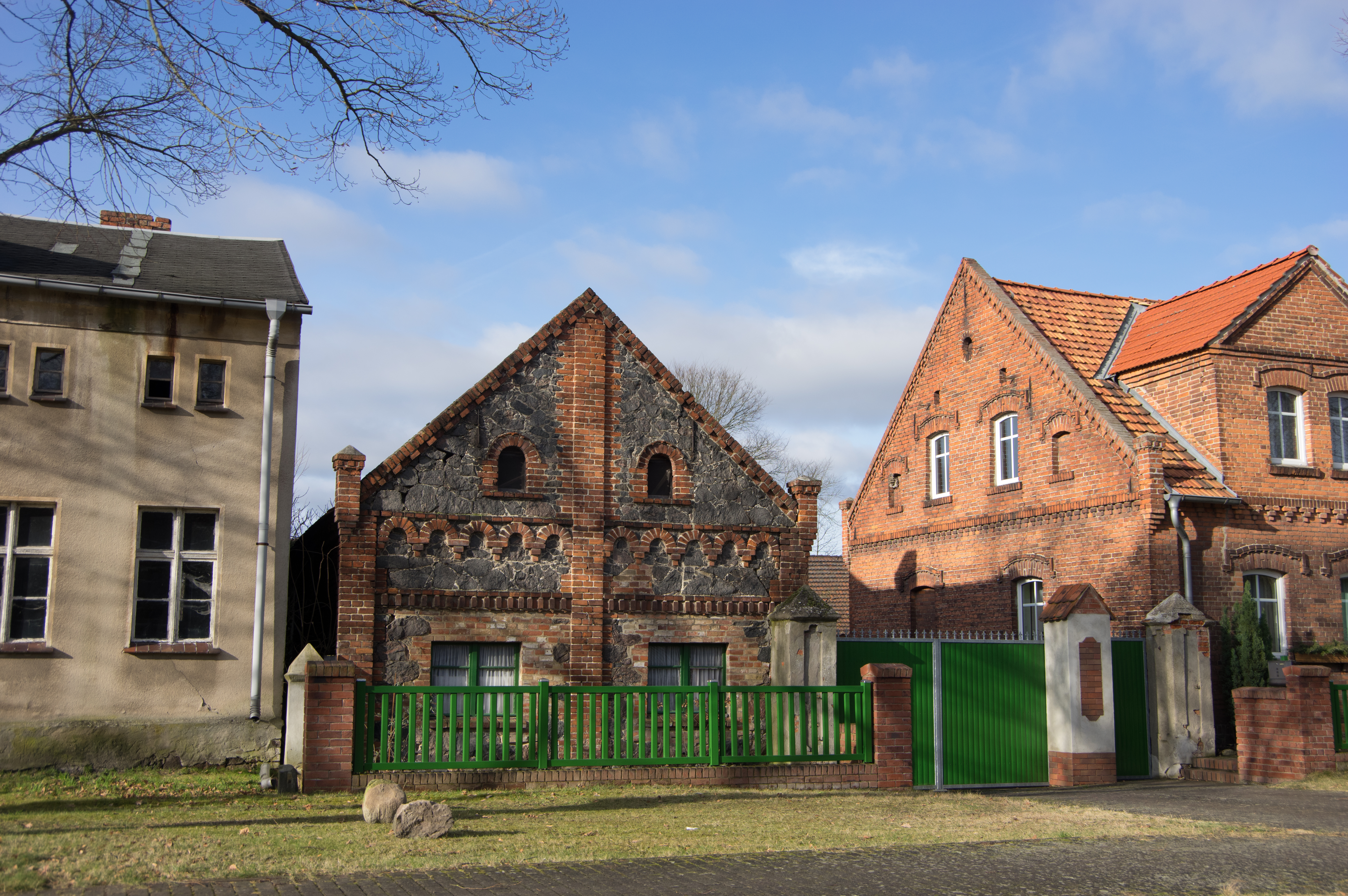 Märkische Heide, Ortsteil Krugau in Brandenburg. Das Wirtschaftsgebäude des Hofes Krugauer Sorfstraße 3 ist ebenso wie der gesamte Hof denkmalgeschützt.